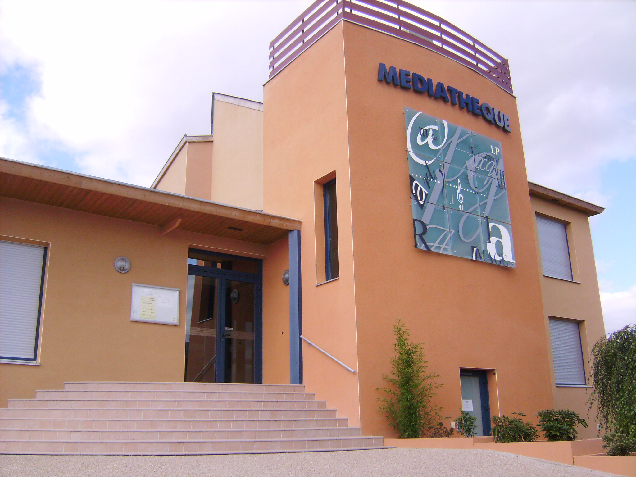 La photographie représente la médiathèque de la commune de Luc-la-Primaube.